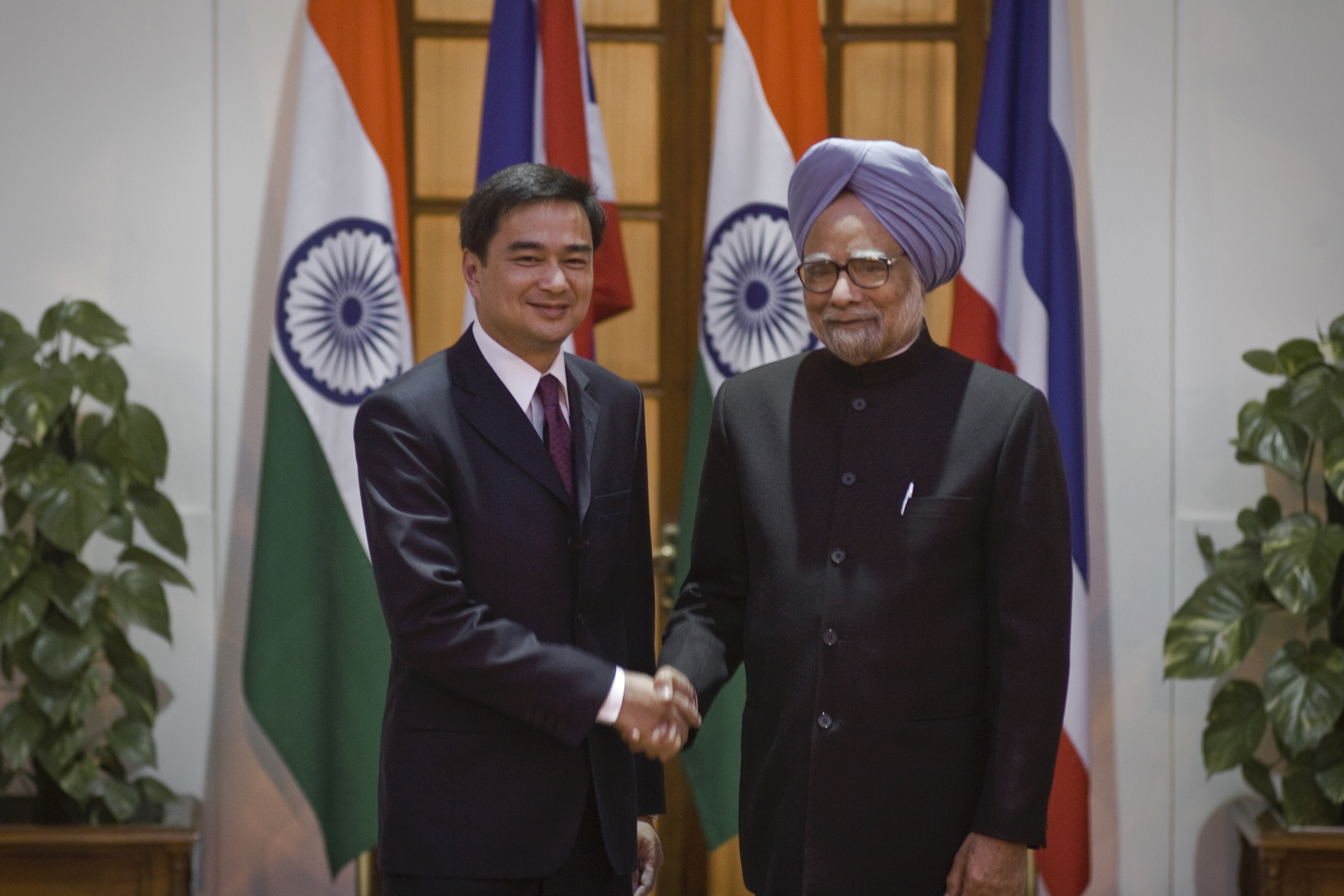 นายกรัฐมนตรีและคณะ เยือนสาธารณรัฐอินเดียอย่างเป็นทางการ วันอังคาร ที่ 5 เมษายน พ.ศ.2554 (Photographer attached to the Prime Minister of the Kingdom of Thailand (H.E.Mr.Abhisit Vejjajiva) : Peerapat Wimolrungkarat / พีรพัฒน์ วิมลรังครัตน์) @is50mm